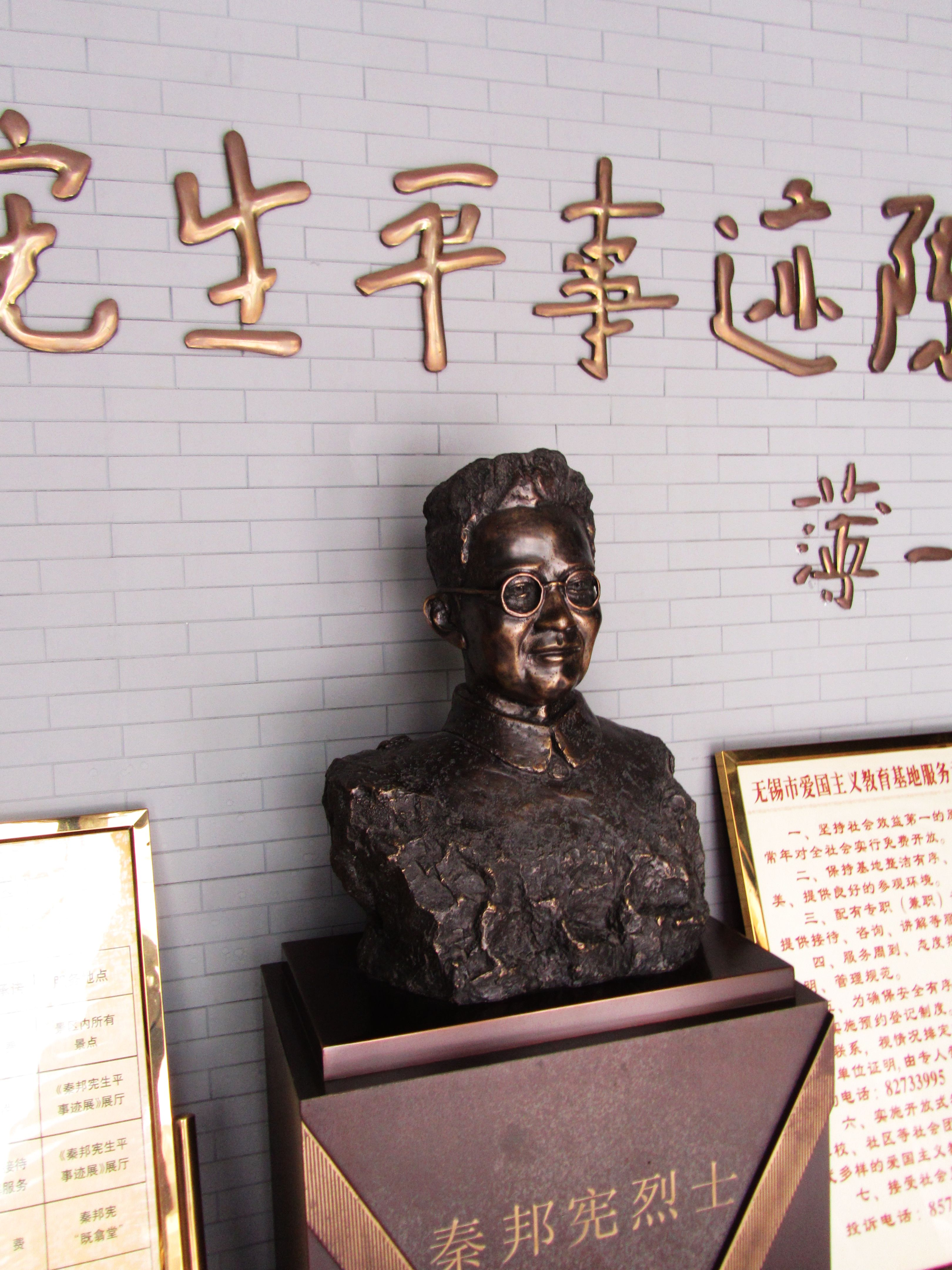 秦邦宪故居，大门内秦邦宪像。